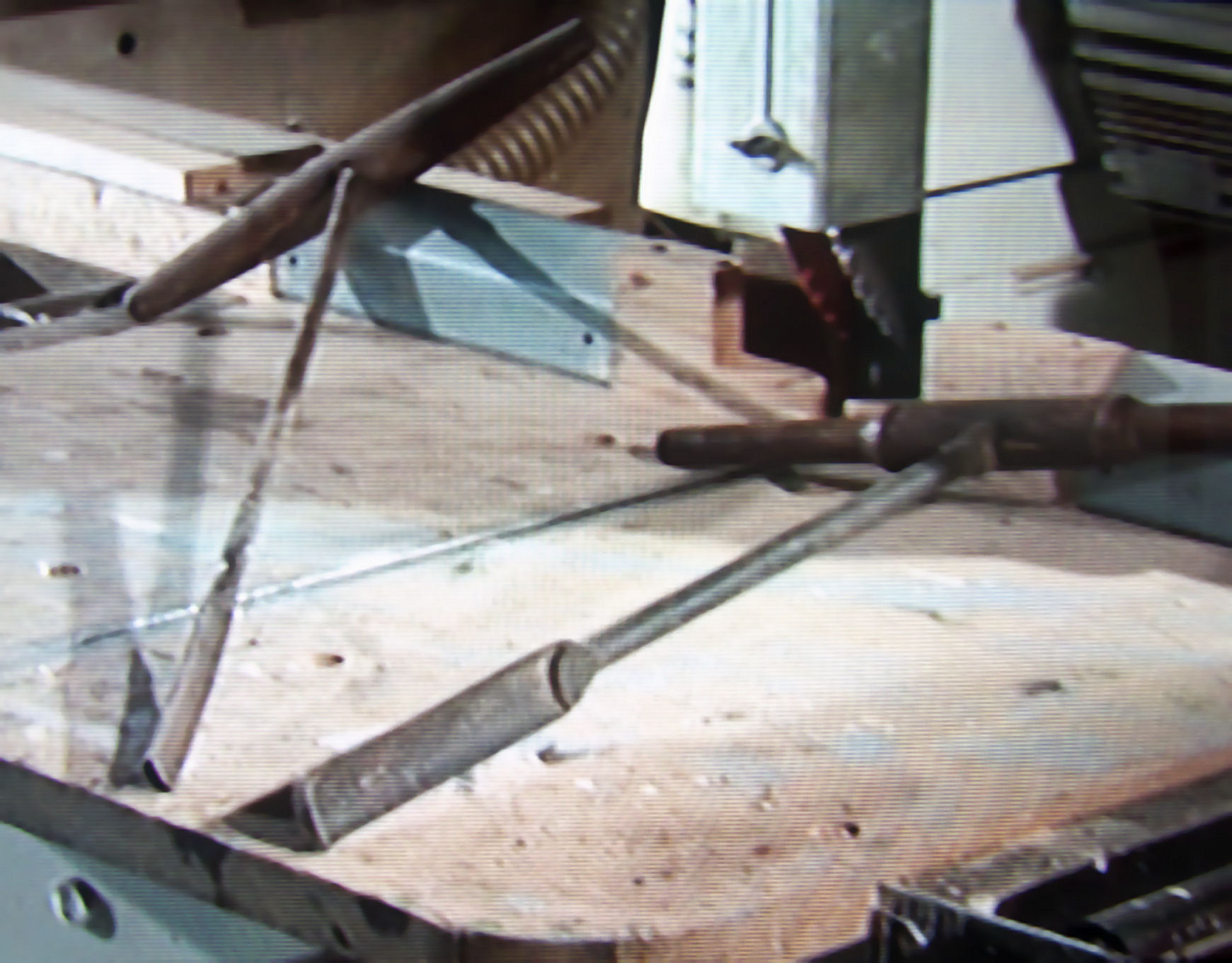 Lepelboor